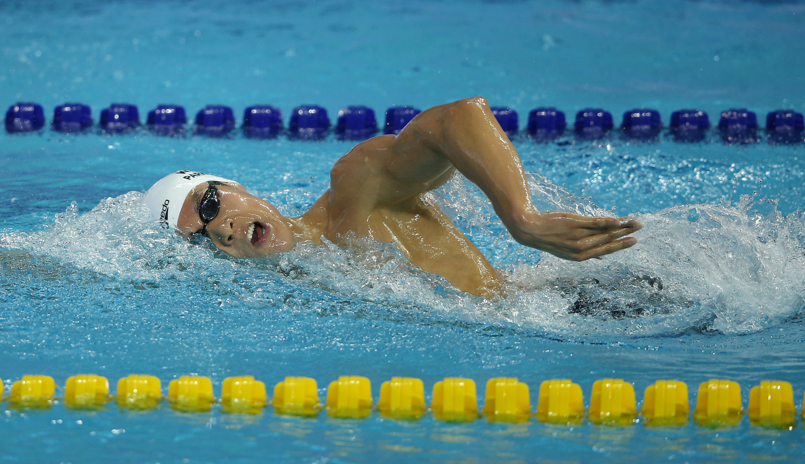 제17회인천아시아경기대회